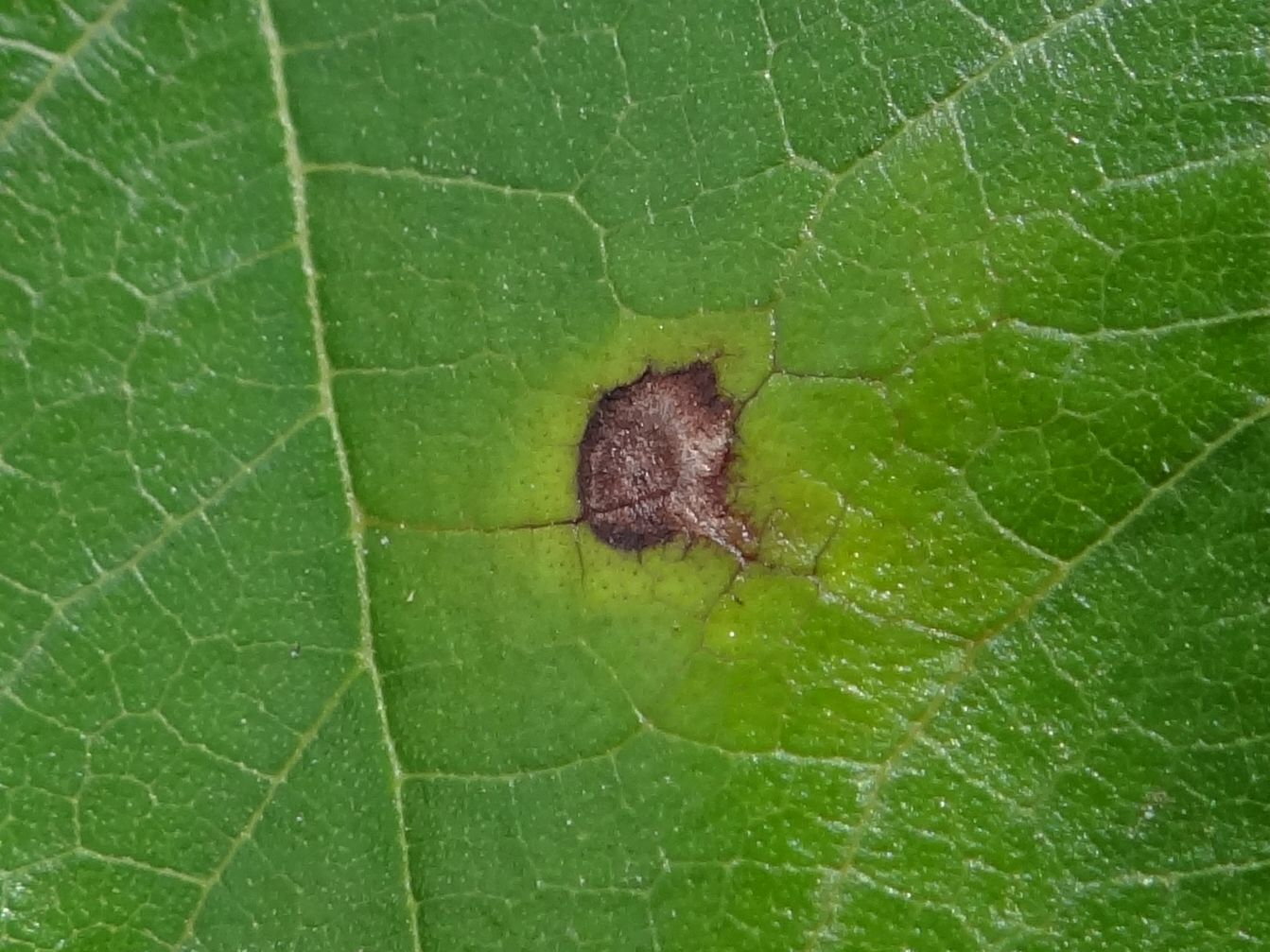 Mycosphaerella mori on leaf Morus alba. Location: Poland, Trzciana, województwo małopolskie